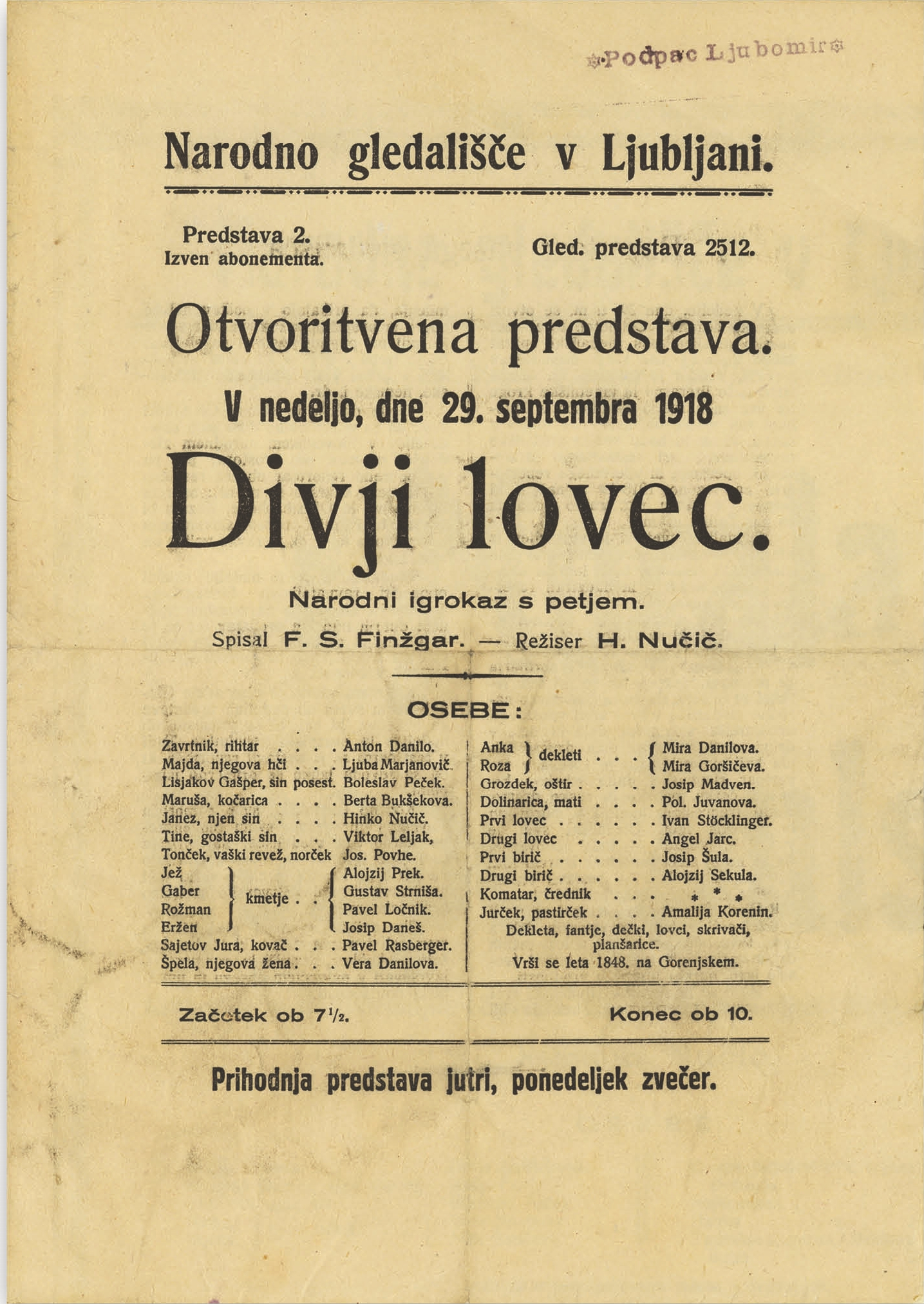 Plakat za predstavo Divji lovec v Narodnem gledališču.